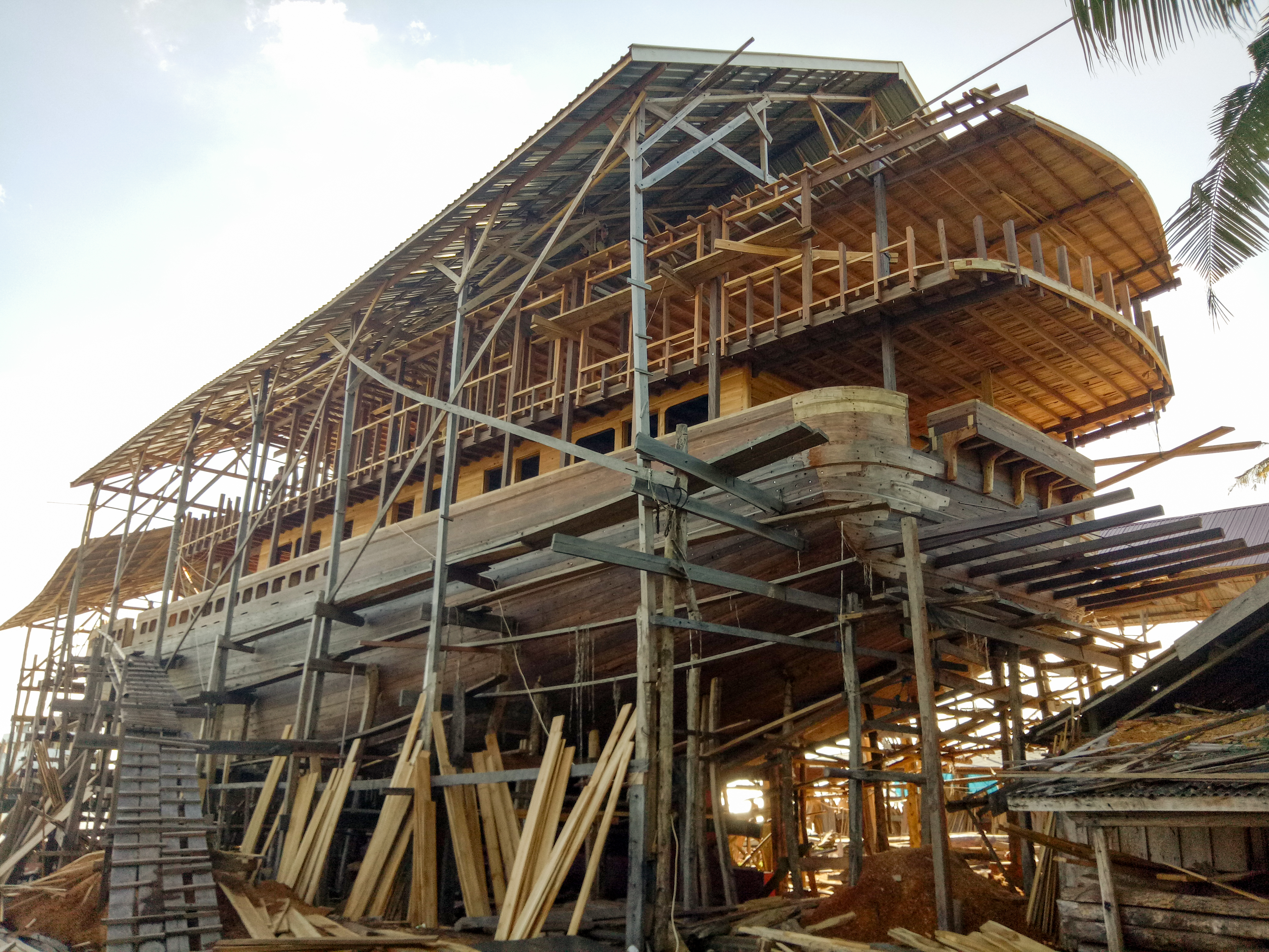 Kapal Pinisi menunggu untuk disempurnakan oleh para pengrajinnya. Lokasi : Pesisir Tanaberu, Bulukumba, Sulawesi Selatan.